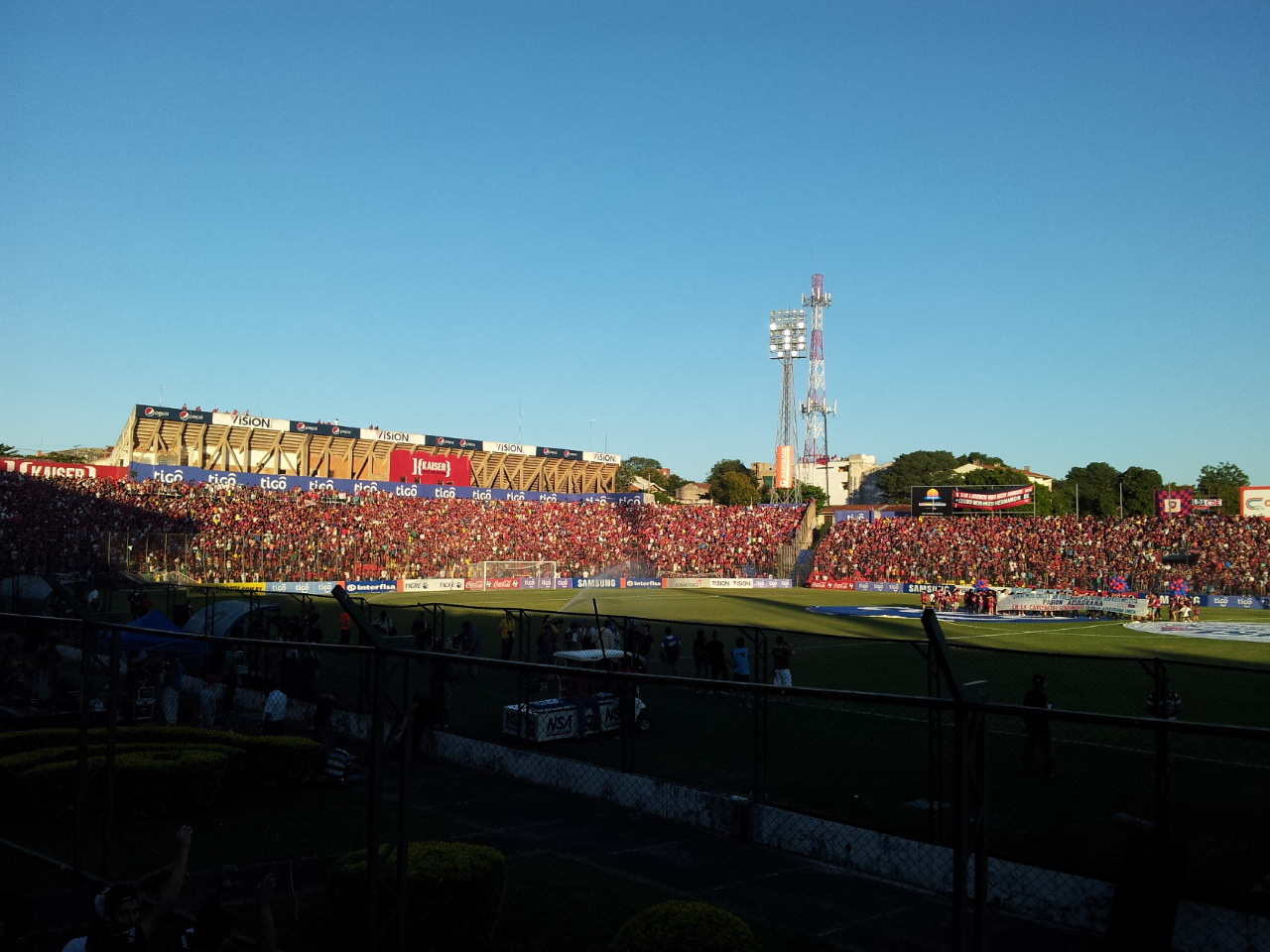 Partido entre Cerro Porteño y Libertad, por el Torneo Clausura 2013. El partido terminó con empate 1 a 1, y registró la mayor asistencia en aquel torneo, con 26.000 expectadores.